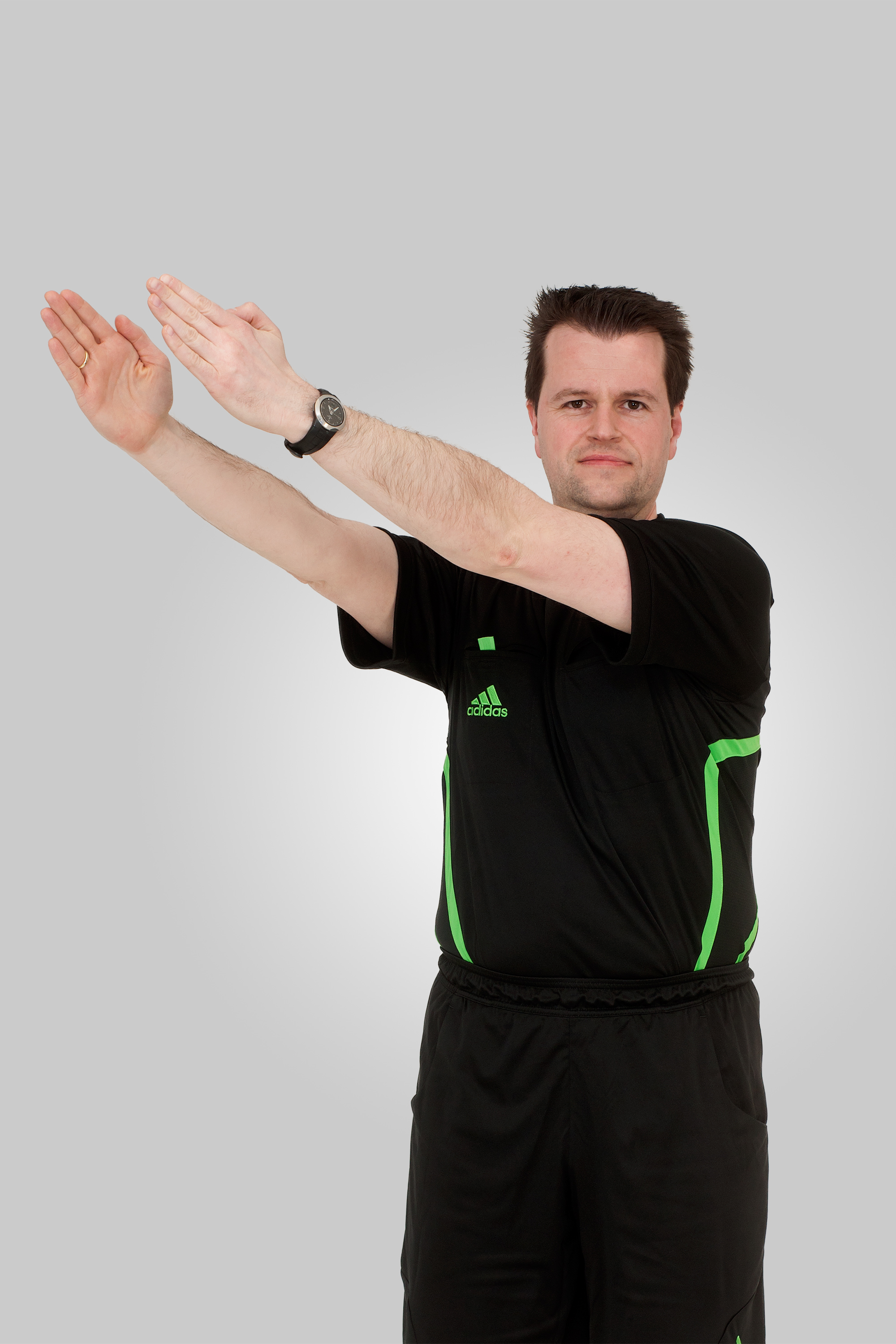 Internationale Handballregeln Handzeichen 07 Einwurf-Richtung